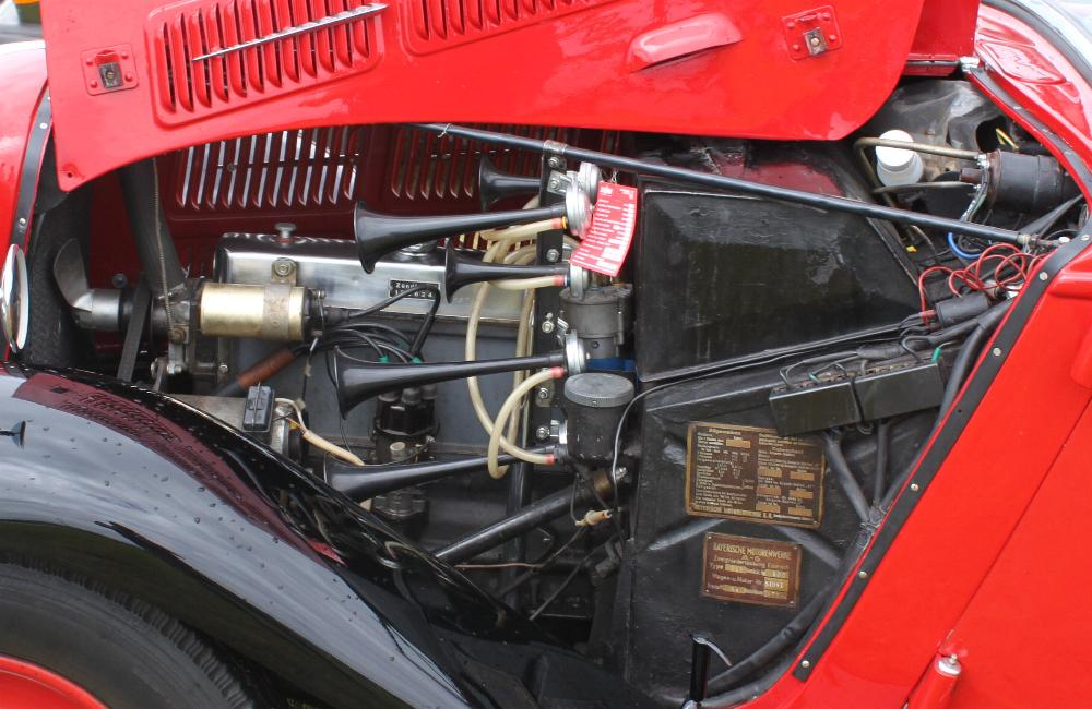 Motor eines BMW-315, Bj. 1935, 6 Zylinder, 34 PS